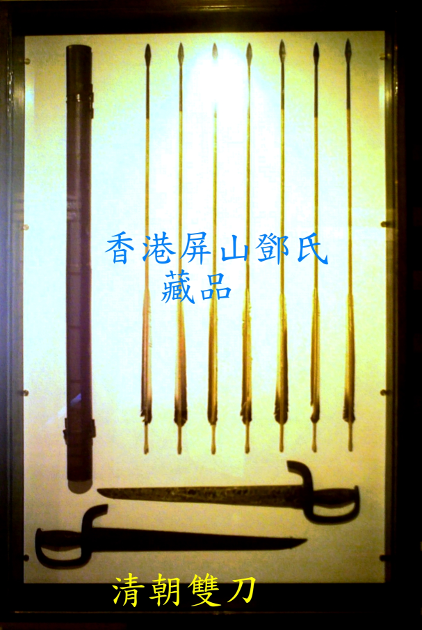 中文（香港）: 清朝雙刀